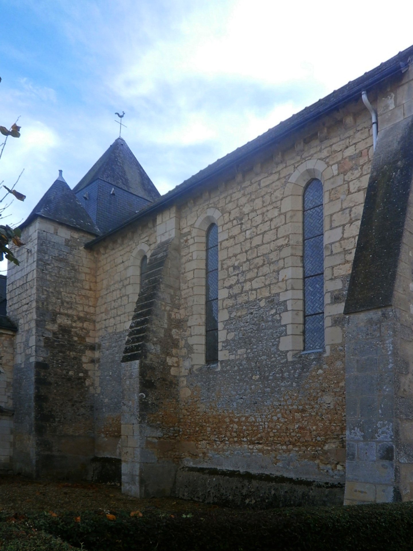 ¨Détail du mur nord de la nef de l'église Saint-Aignan